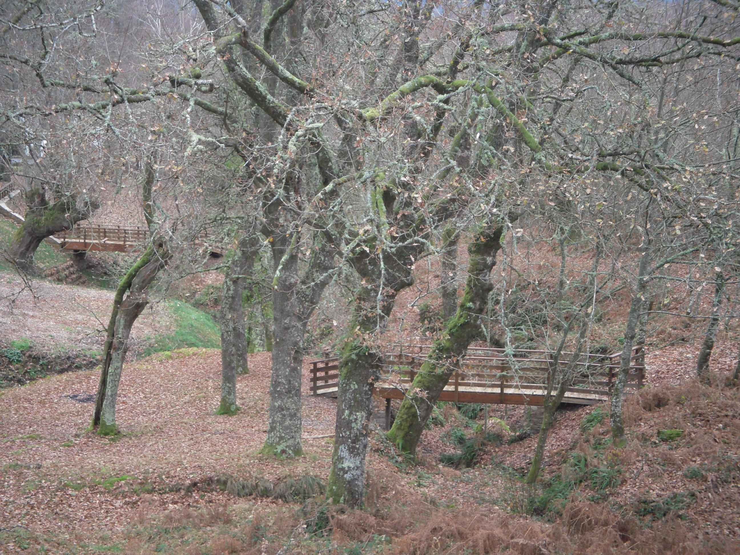 Paseo al lado de la Feria